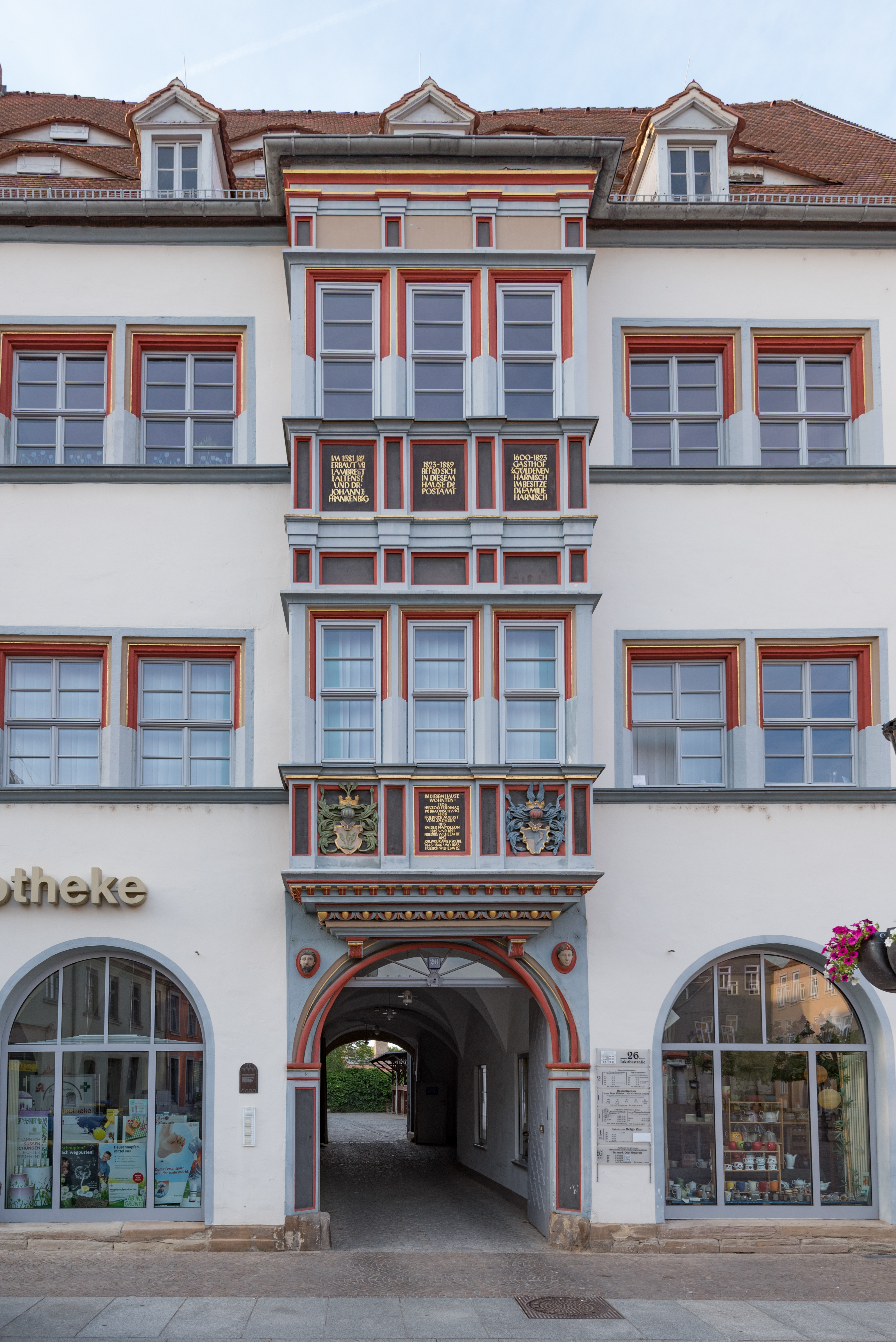 Naumburg (Saale), Jakobstraße 26